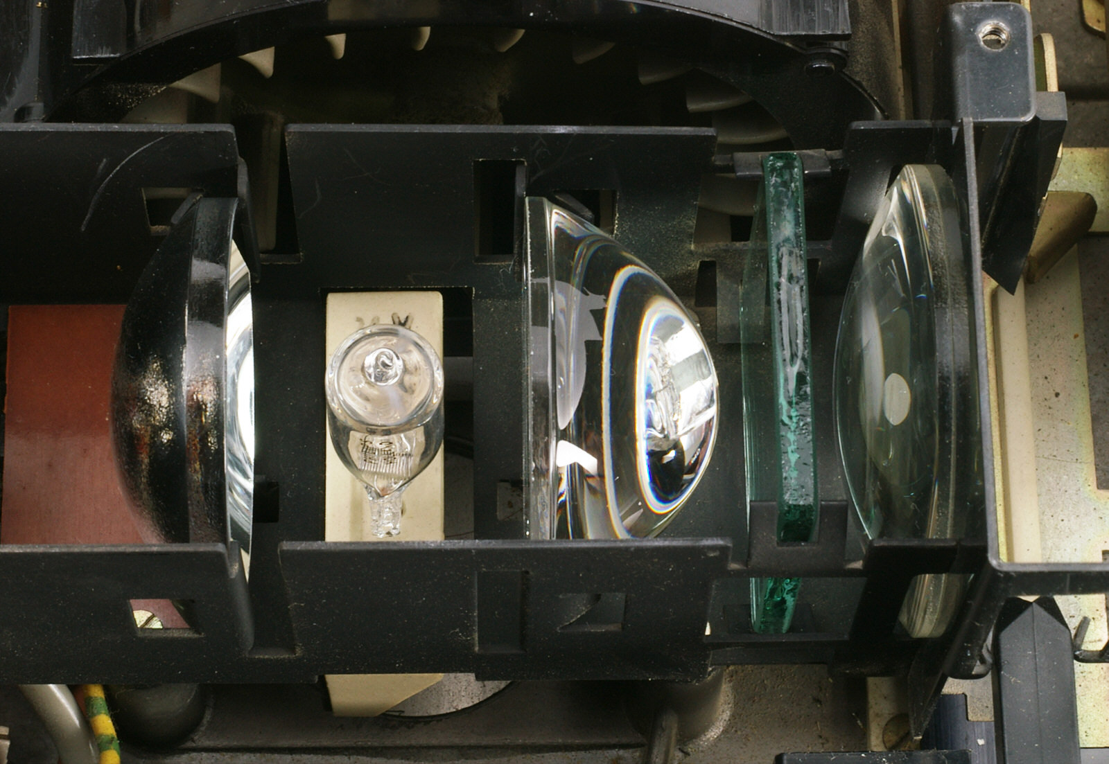 Beleuchtungssystem eines Kleinbild-Diaprojektors. Von links nach rechts: (Kaltlicht-)Hohlspiegel, Halogen-Leuchtmittel, parabolische Kondensorlinse, Wärmeschutzfilter, zweiter Kondensor, Dia-Bühne. Oben ist ein Teil des Lüfters zu erkennen.